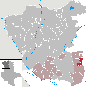 (Original text: Hottendorf im Landkreis Salzwedel)